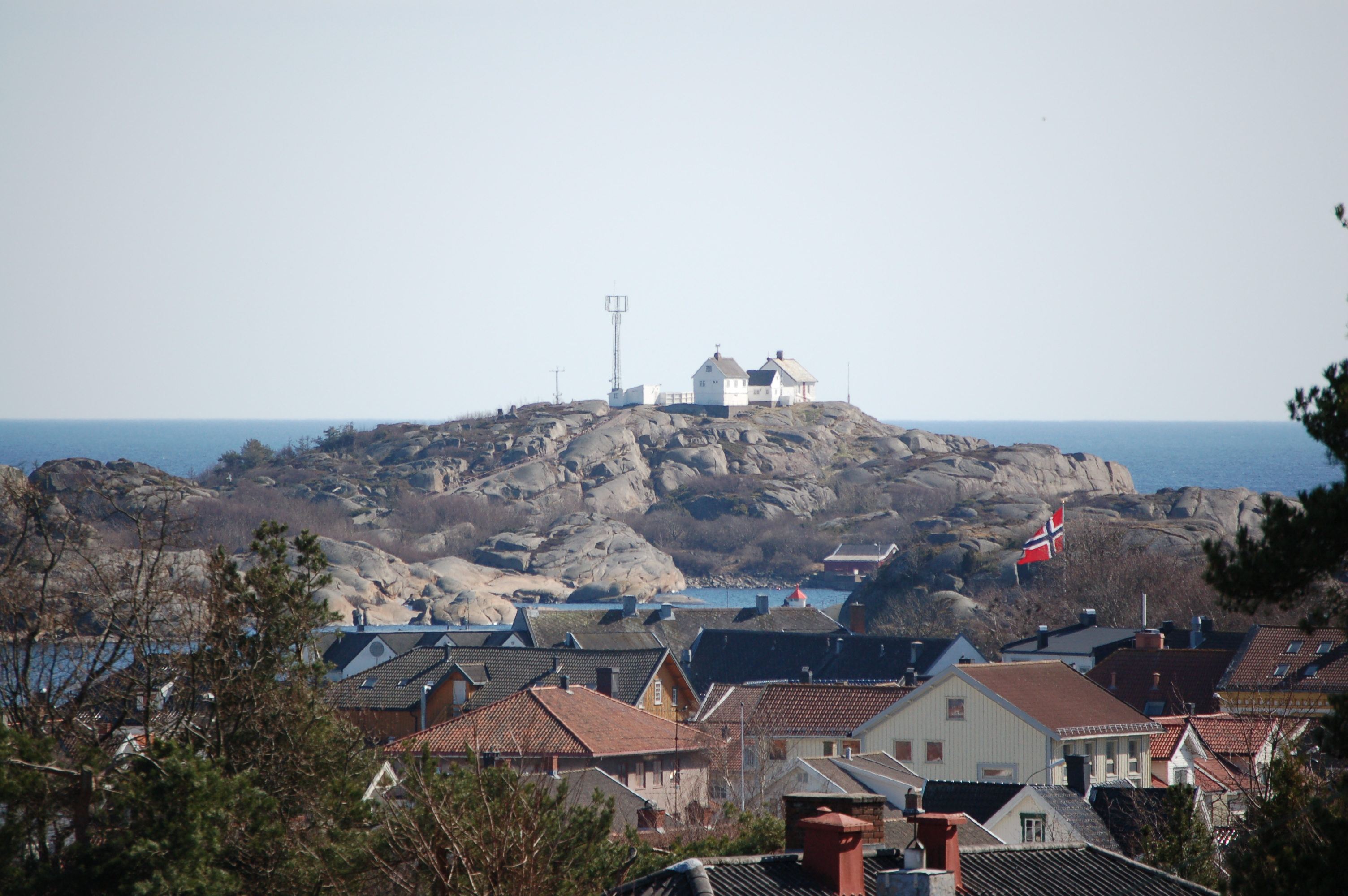 Stavernodden fyr sett fra Vardeveien i Stavern.